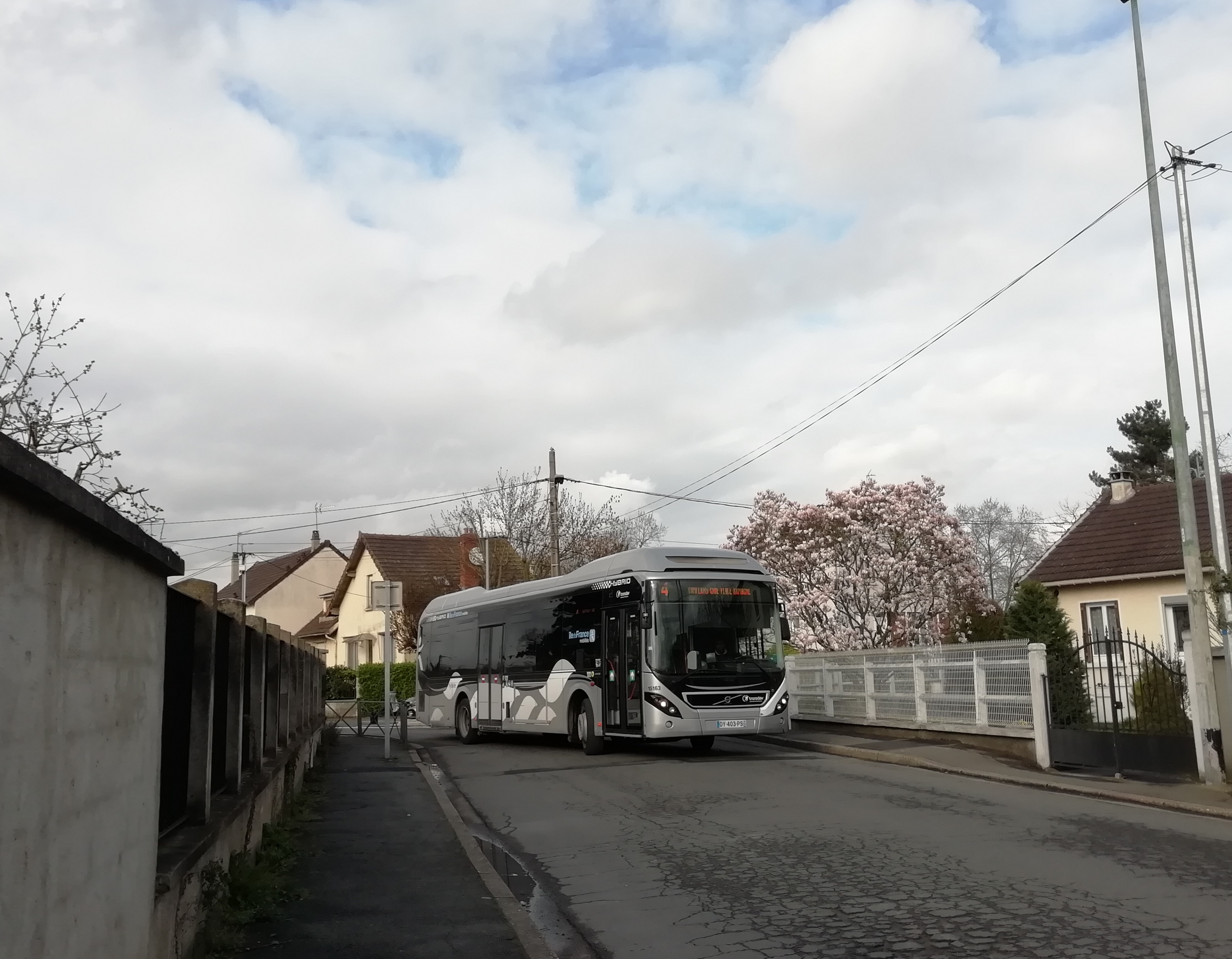 Volvo 7900 hybride de Transdev Conflans sur la ligne 4 samedi 14 mars 2020